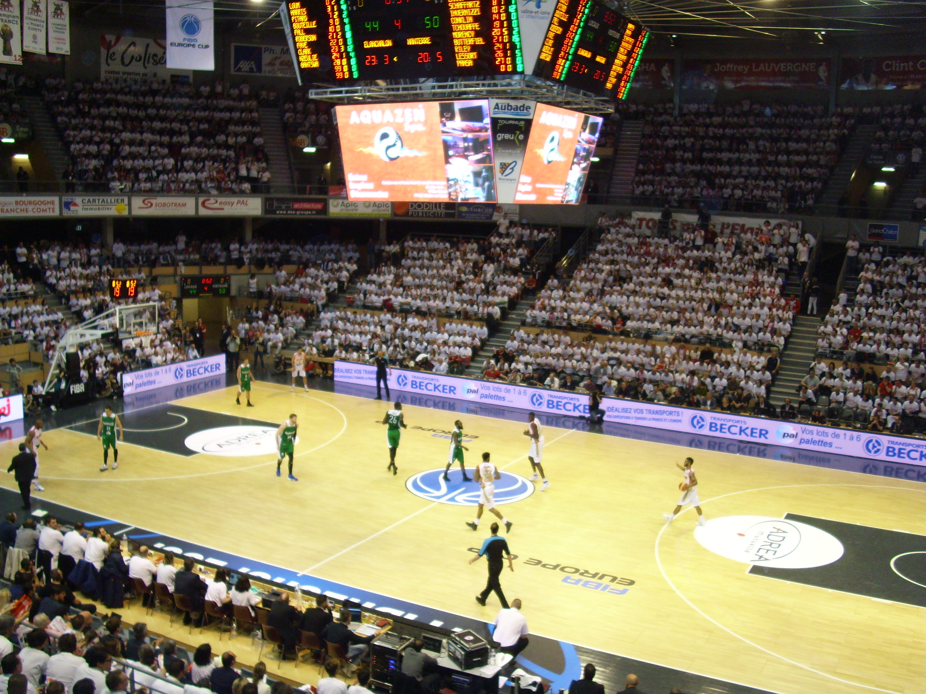 Finale aller de la Coupe d'Europe FIBA 2016-2017 au Colisée entre l'Elan Chalon et Nanterre. Action de match.